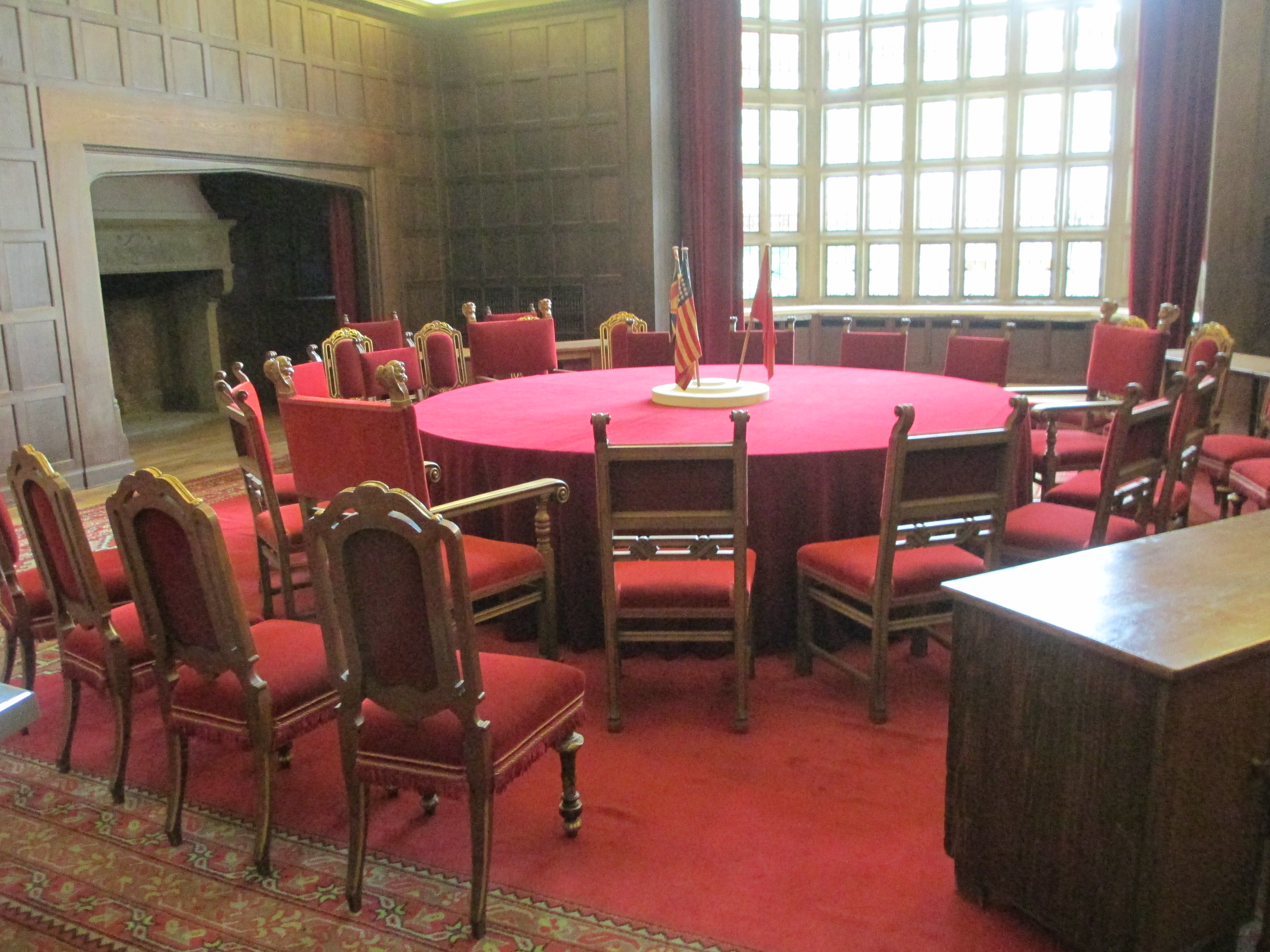 השולחן העגול של ועידת פוטסדאם בארמון סיסיליינהוף